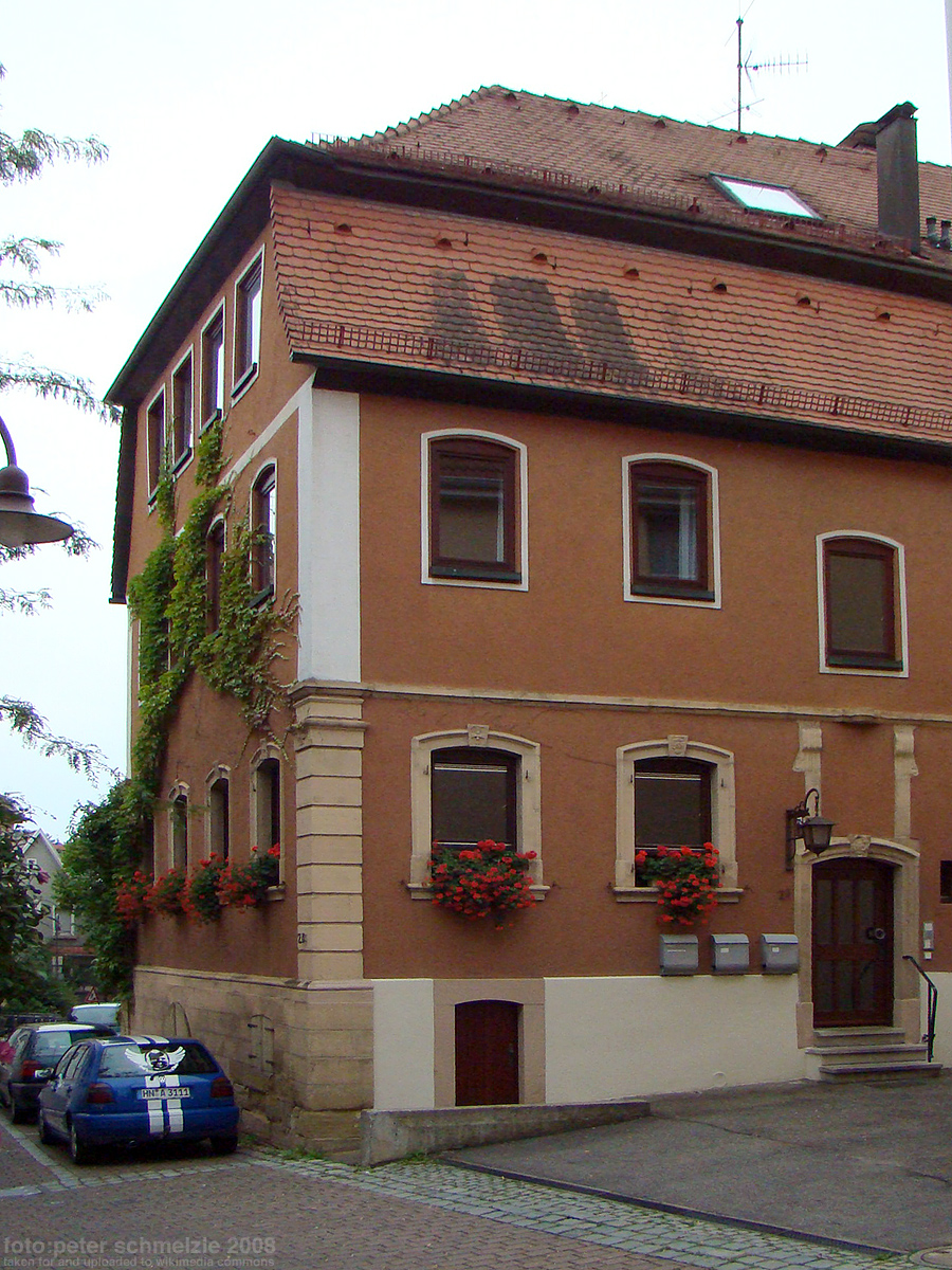 Denkmalgeschütztes Gebäude Hauptstr. 20 in Heilbronn-Sontheim